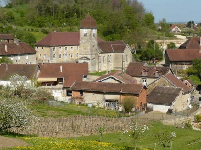 Vue du village de Vadans, côté château fort.